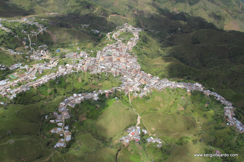 Vista aérea de Anorí, Antioquia.